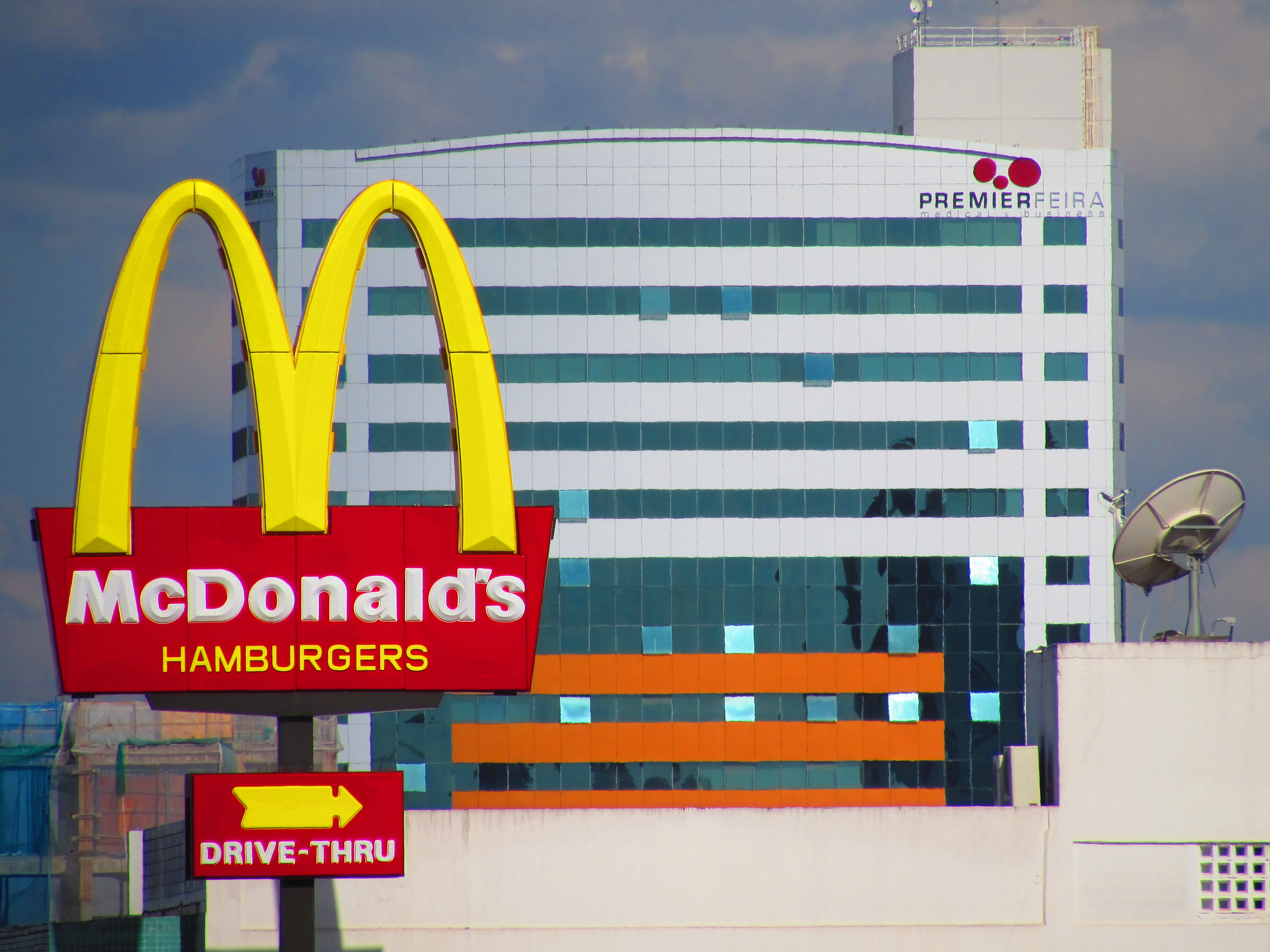 franquia em FSA